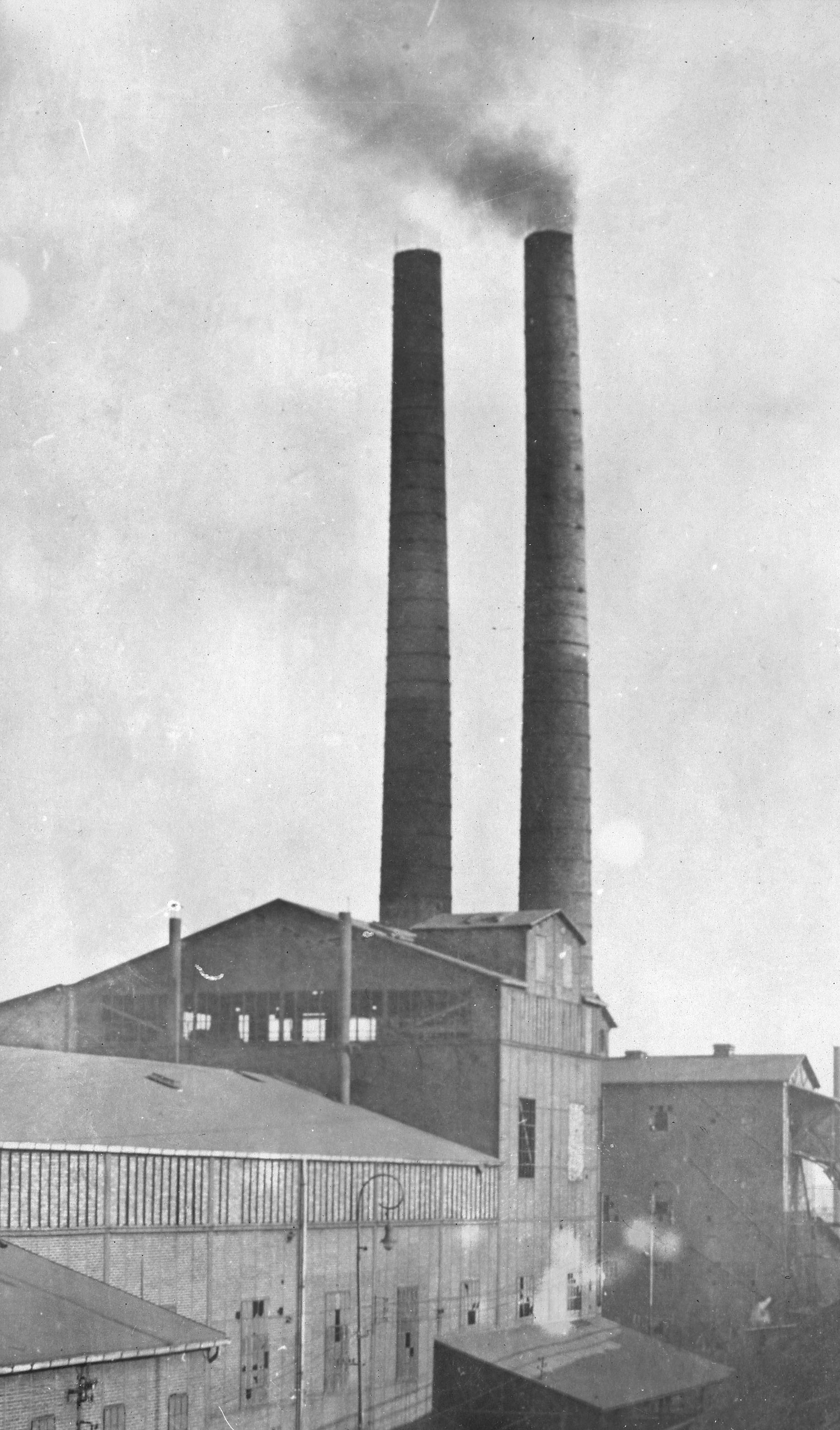 Lysaker Kemiske kunne være en plage for nærmiljøet og røyken fra pipene kunne svi i øynene på folk.